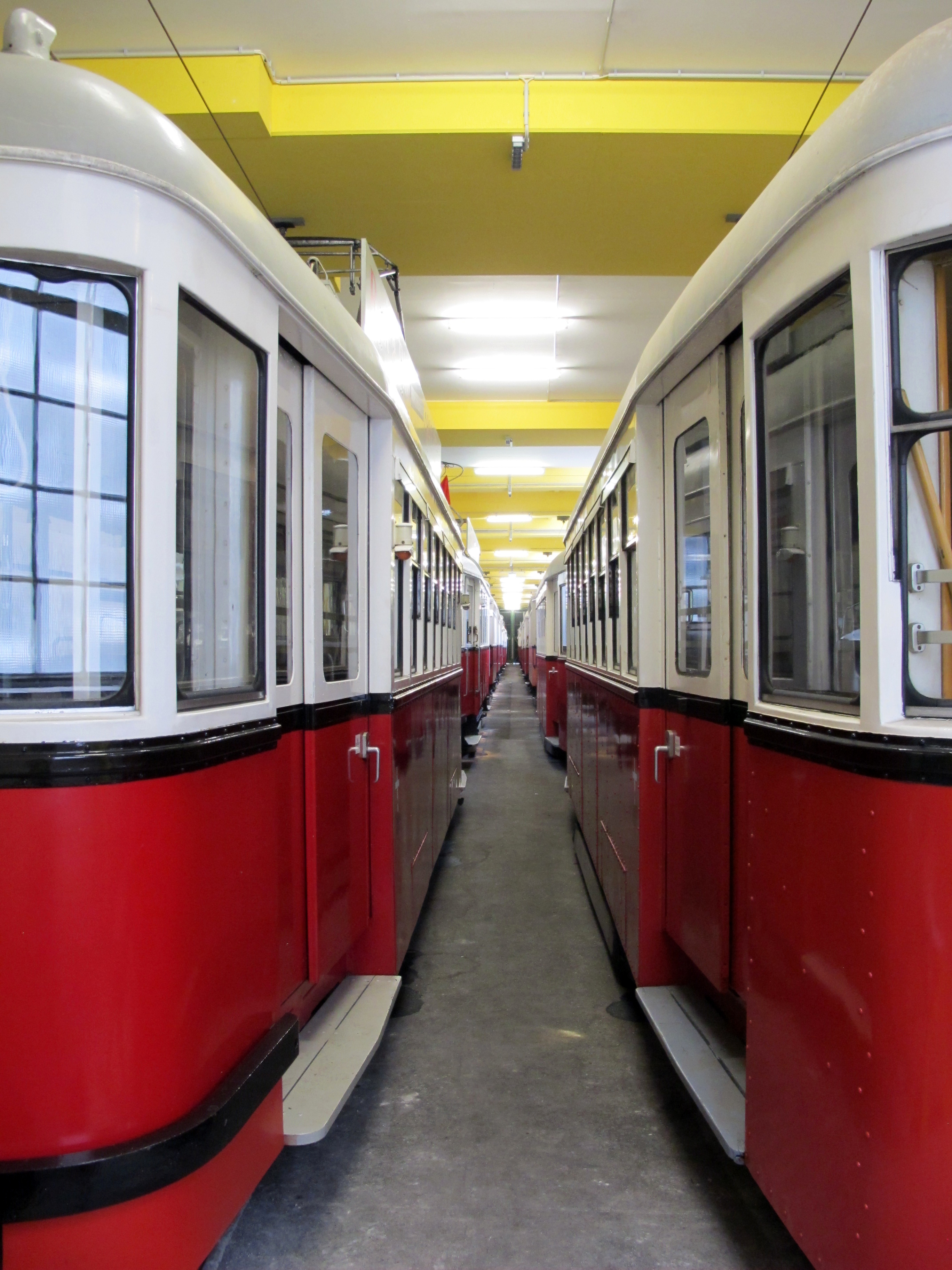 Wiener Straßenbahnmuseum - Blick in das Fahrzeugdepot. Abgestellte, betriebsfähige Museumstrassenbahnen